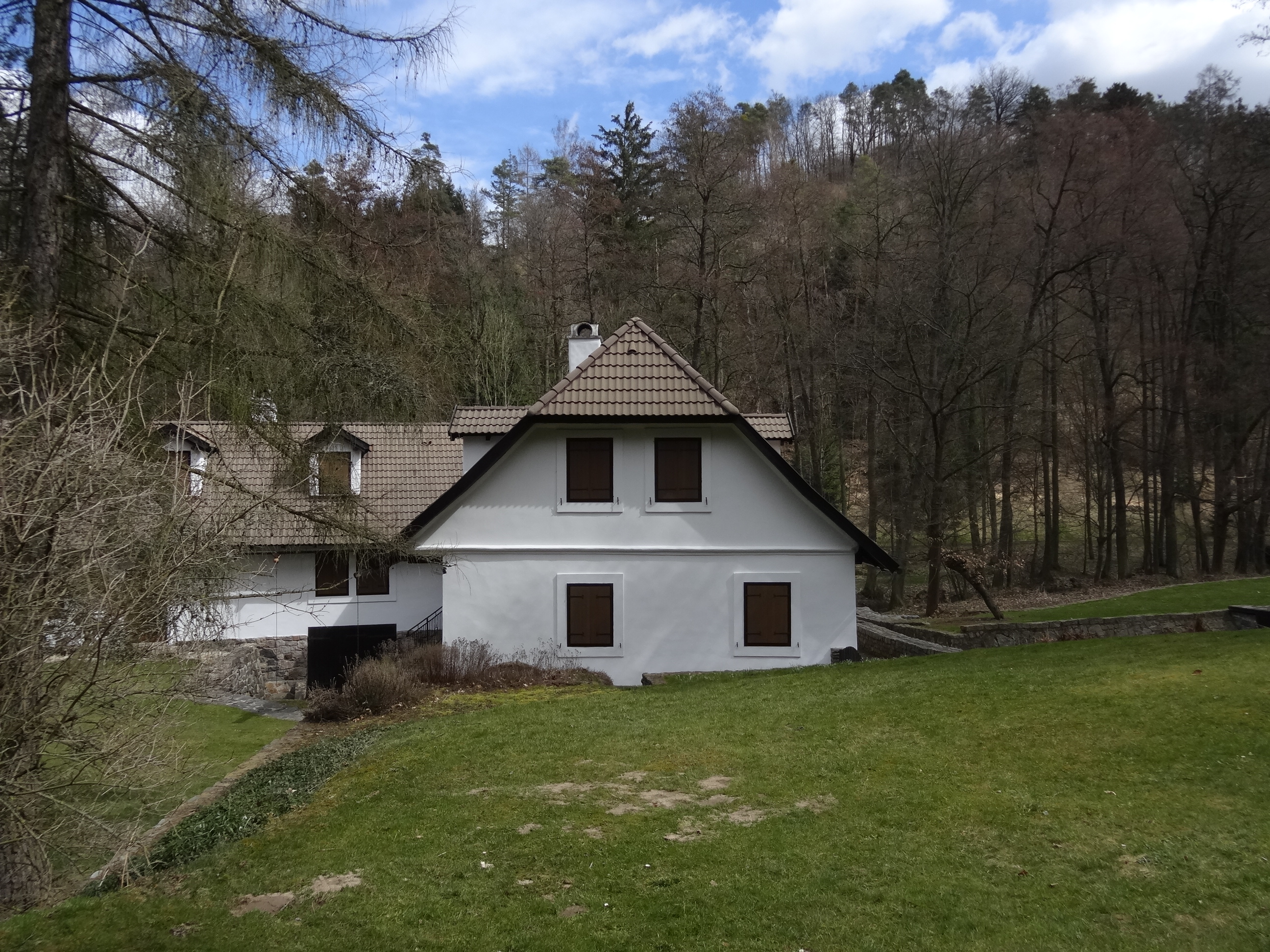 Vodní mlýn, Kožlí če. 2, Kožlí (Neveklov).